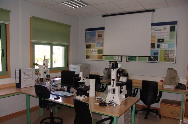 Vista del aula de microscopía de la Estación de Hidrobiología "Encoro do Con"